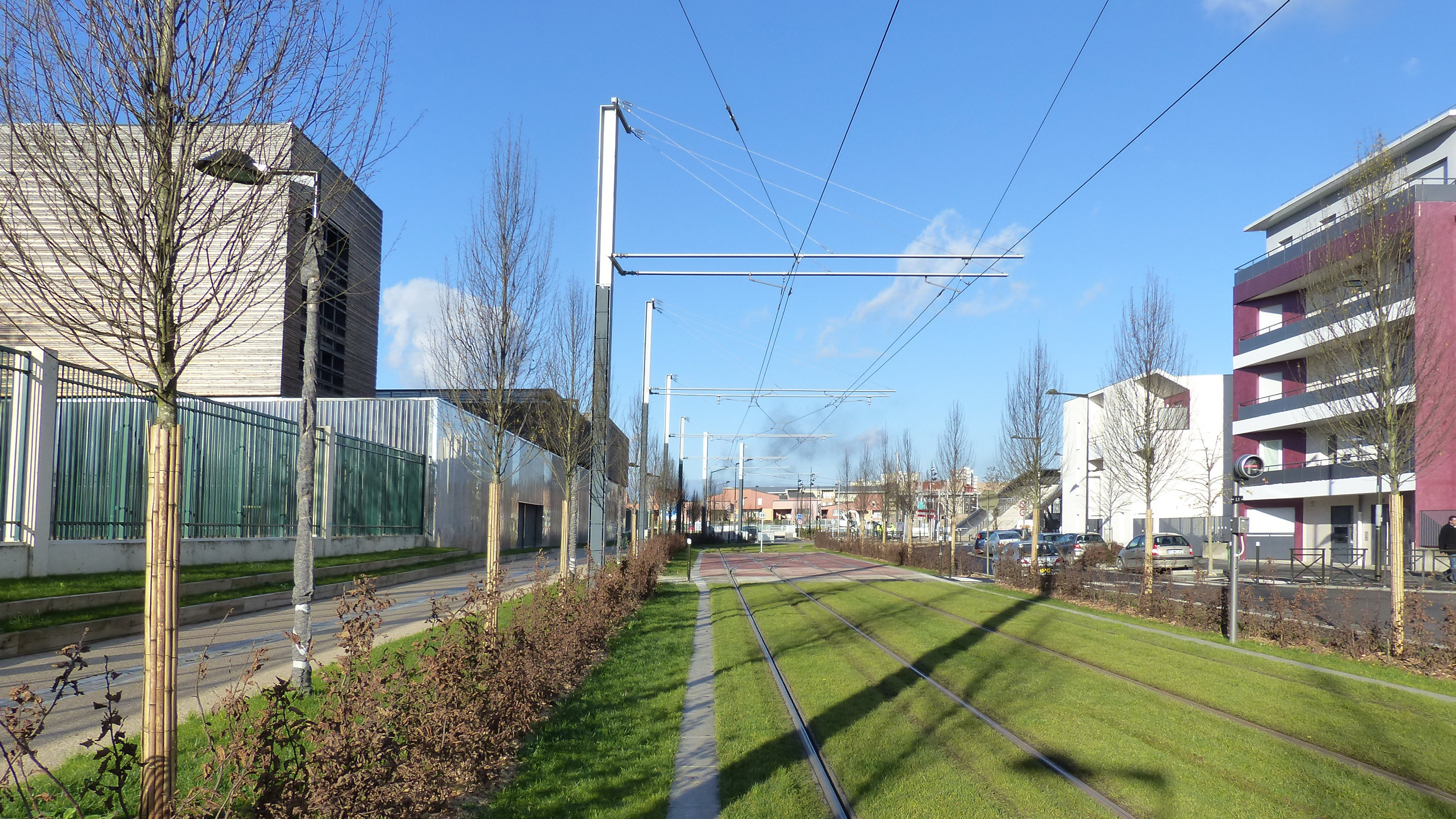 Nouveau paysage urbain dans le centre universitaire et urbain de Villetaneuse : la rue de l'Université avec au centre la voie du tramway T8, à gauche le gymnase universitaire Jesse Richardson, à droite la rue et ses immeubles conçus par François Pellegrin pour la Foncière-Logement